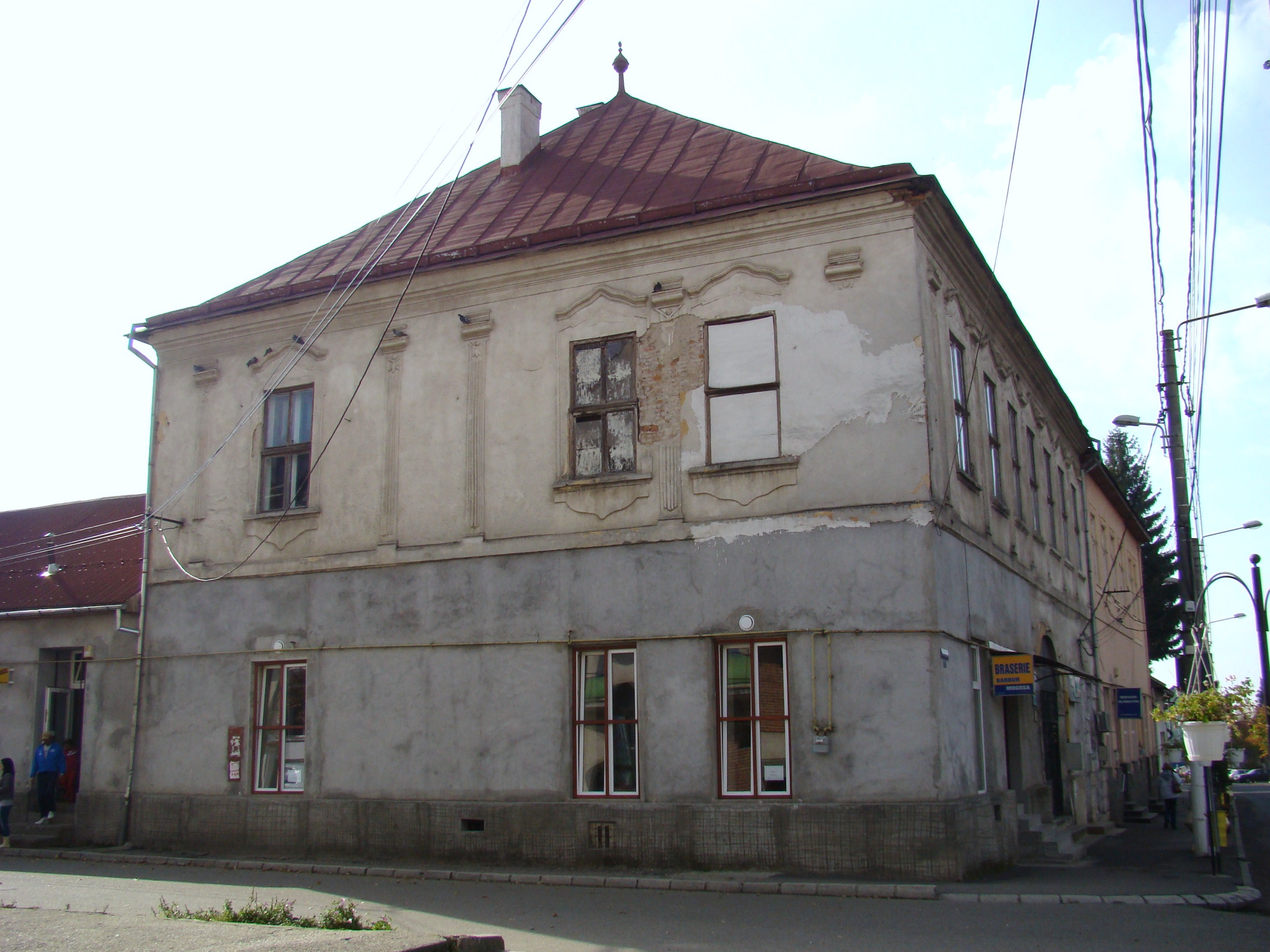 Hotel "Corona", oraș Baia Sprie, Piața Libertății 1